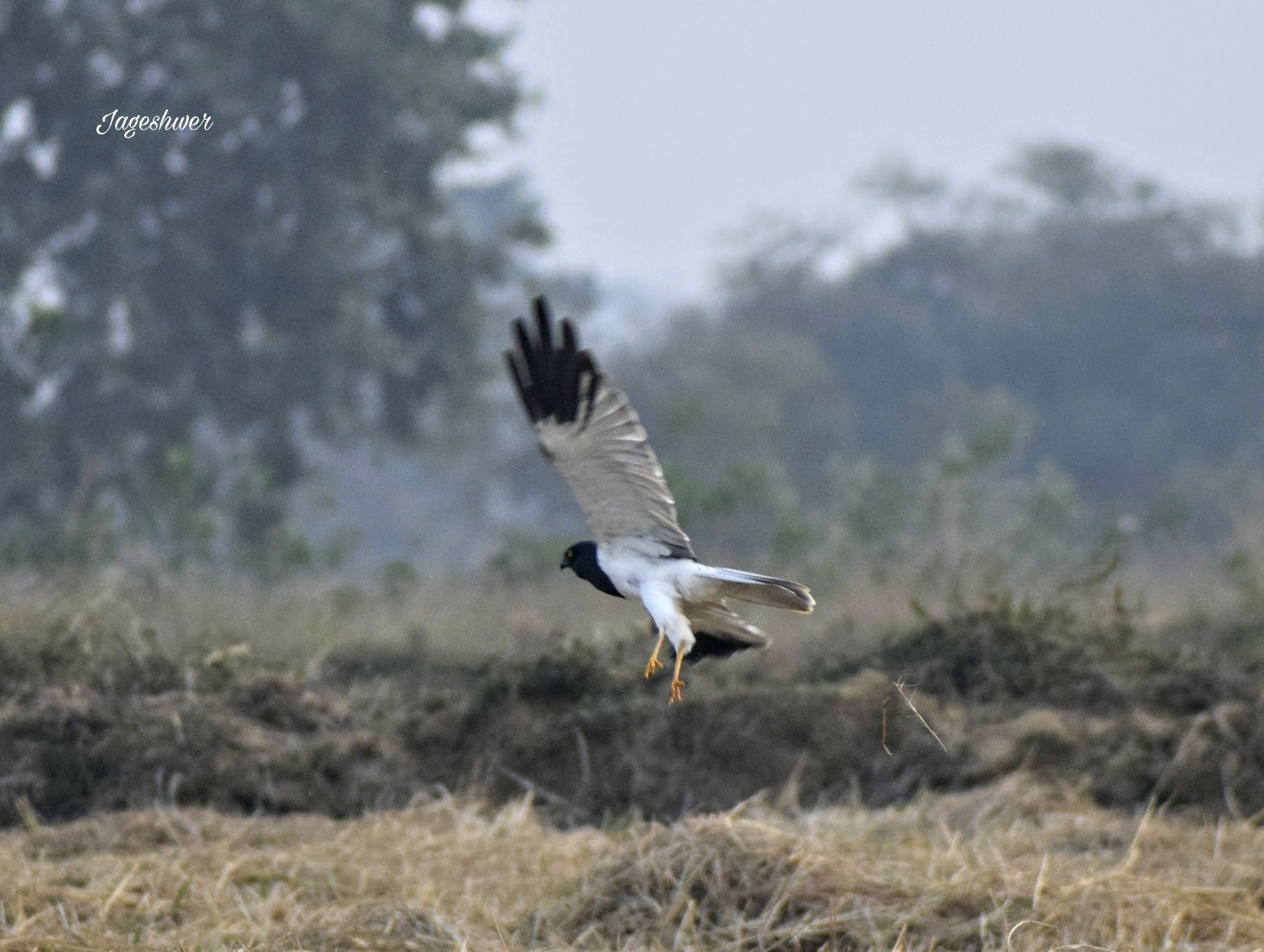 Raipur chhattisgarh,07/12/18, 3:50 pm,Nikon 5300 lens-70-300mm